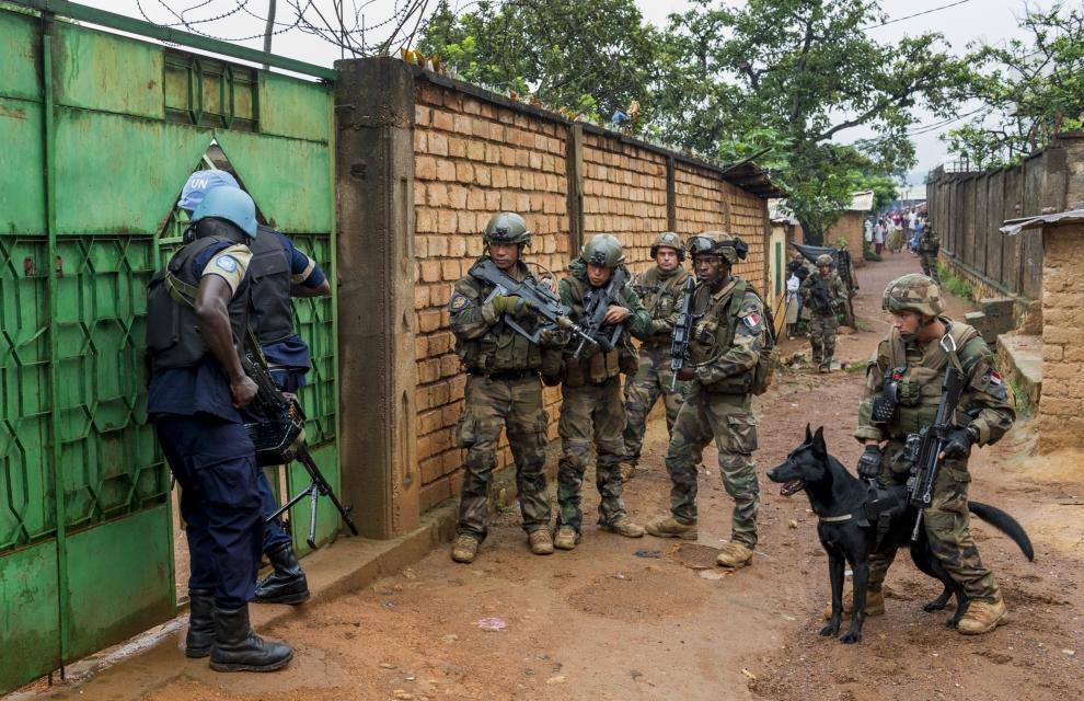 Equipe cyno intégrée dan sun groupe de combat en RCA